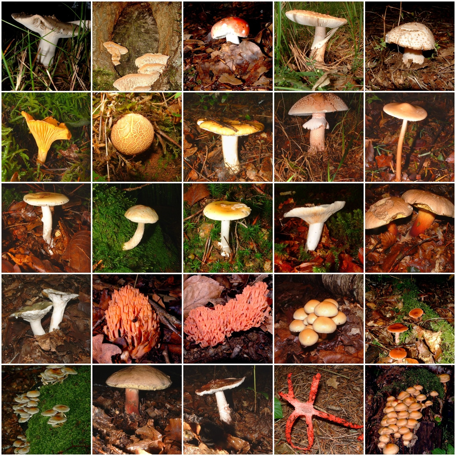 Corrèze juillet 2007. Certains sont difficiles à identifier. Some of them are quite difficult to identify.